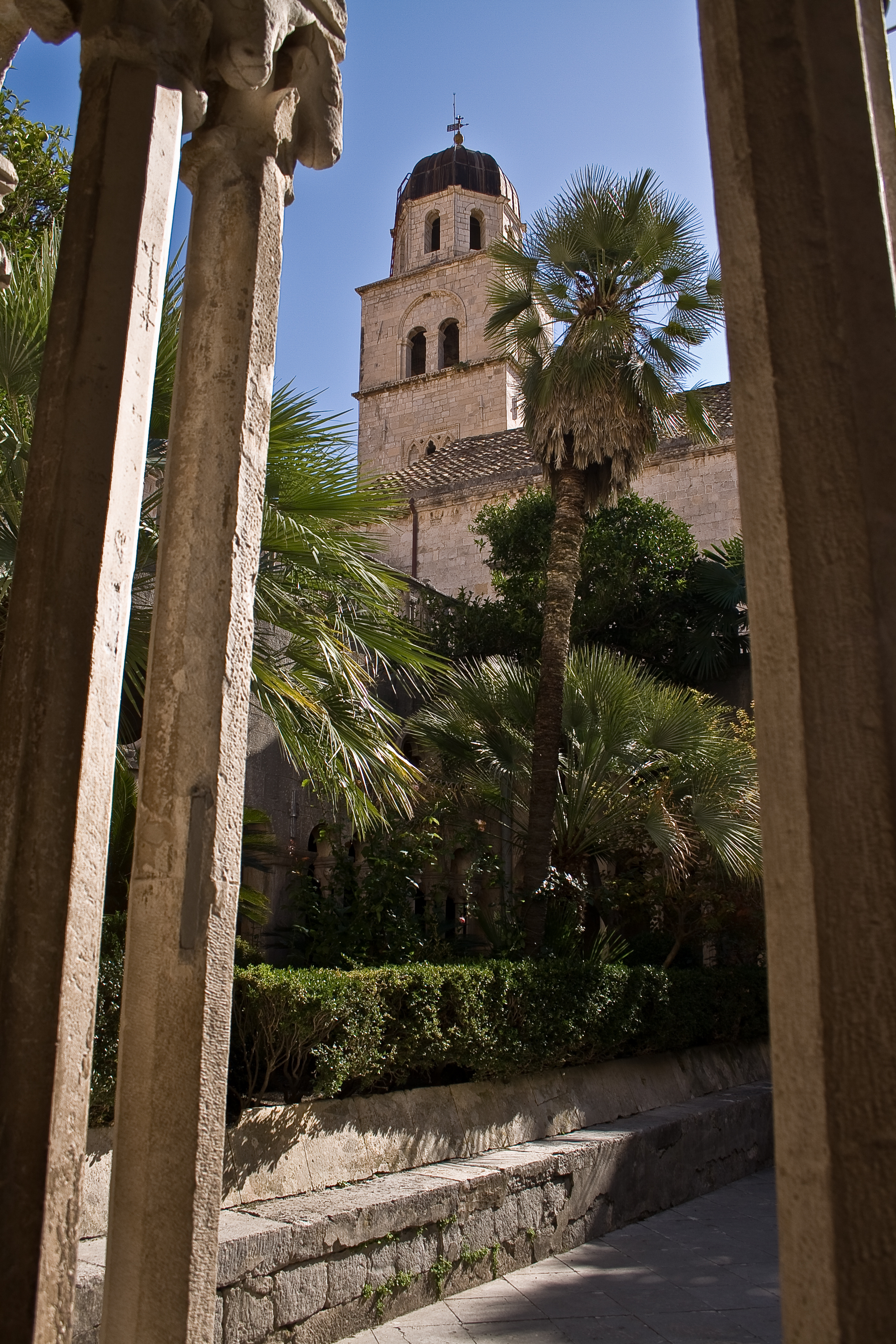 Dubrovnik,_Franziskanerkloster,_Innenansicht